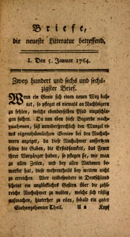 Erste Seite der "Briefe, die neueste Litteratur betreffend", aus dem ersten Teilband von 1764, erschienen in der Nicolaischen Verlagsbuchhandlung, Berlin.